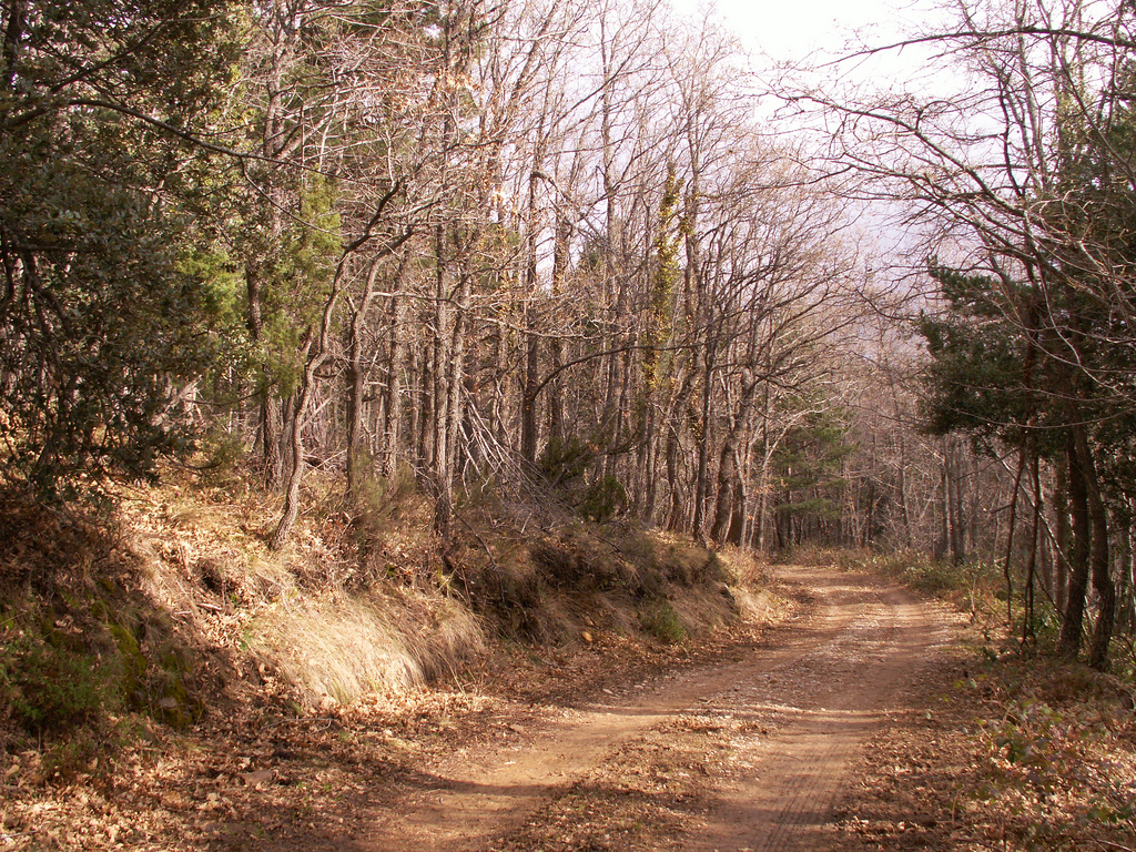 Rebollar en invierno